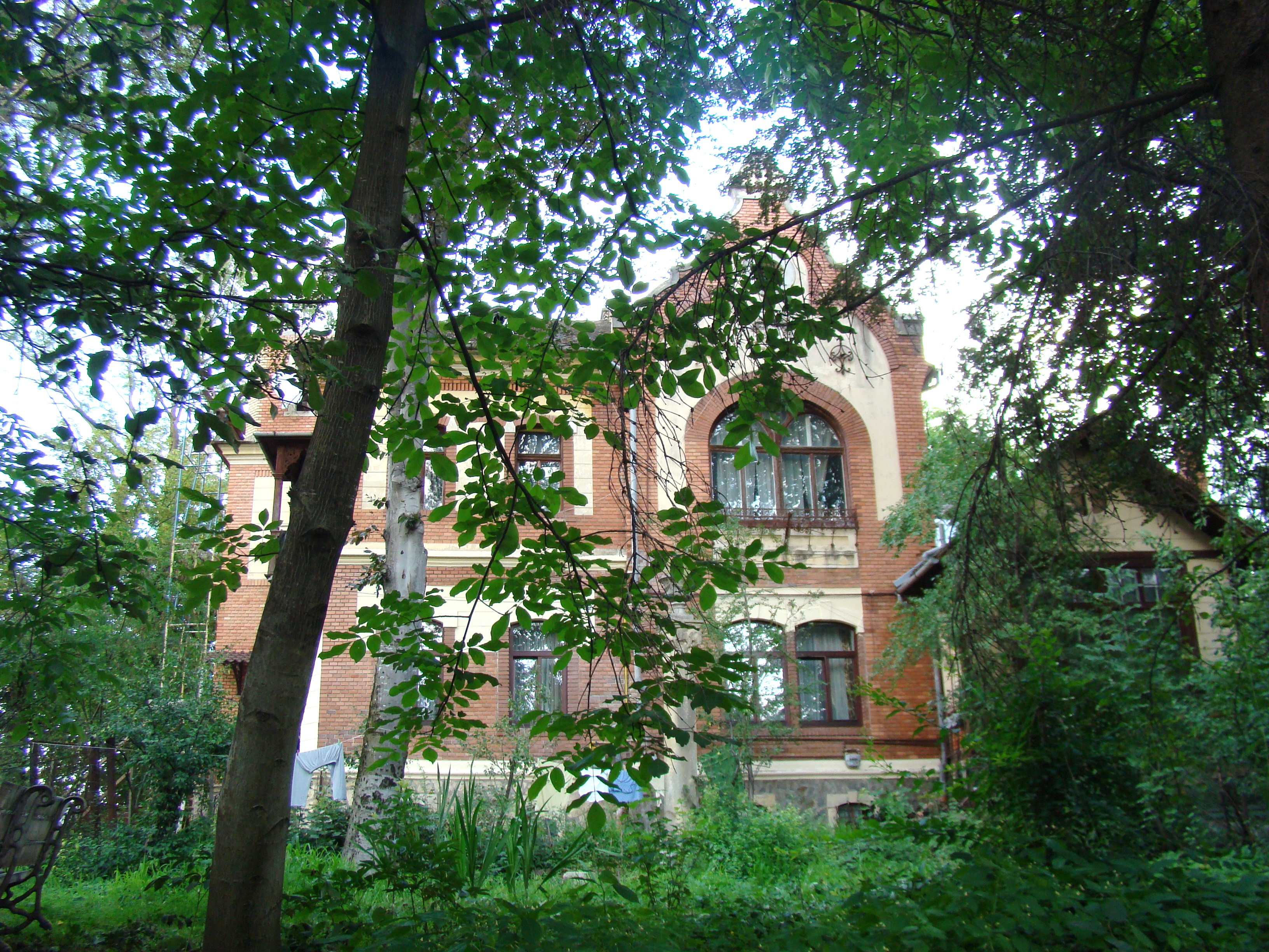 Clădire monument istoric, str.Republicii, nr. 41